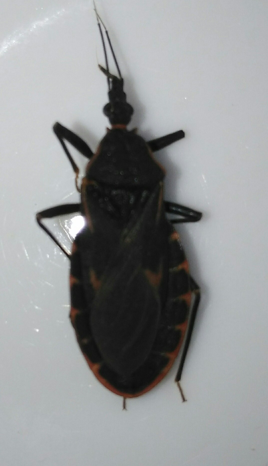 Bọ xít hút máu ở Việt Nam (TP.HCM)